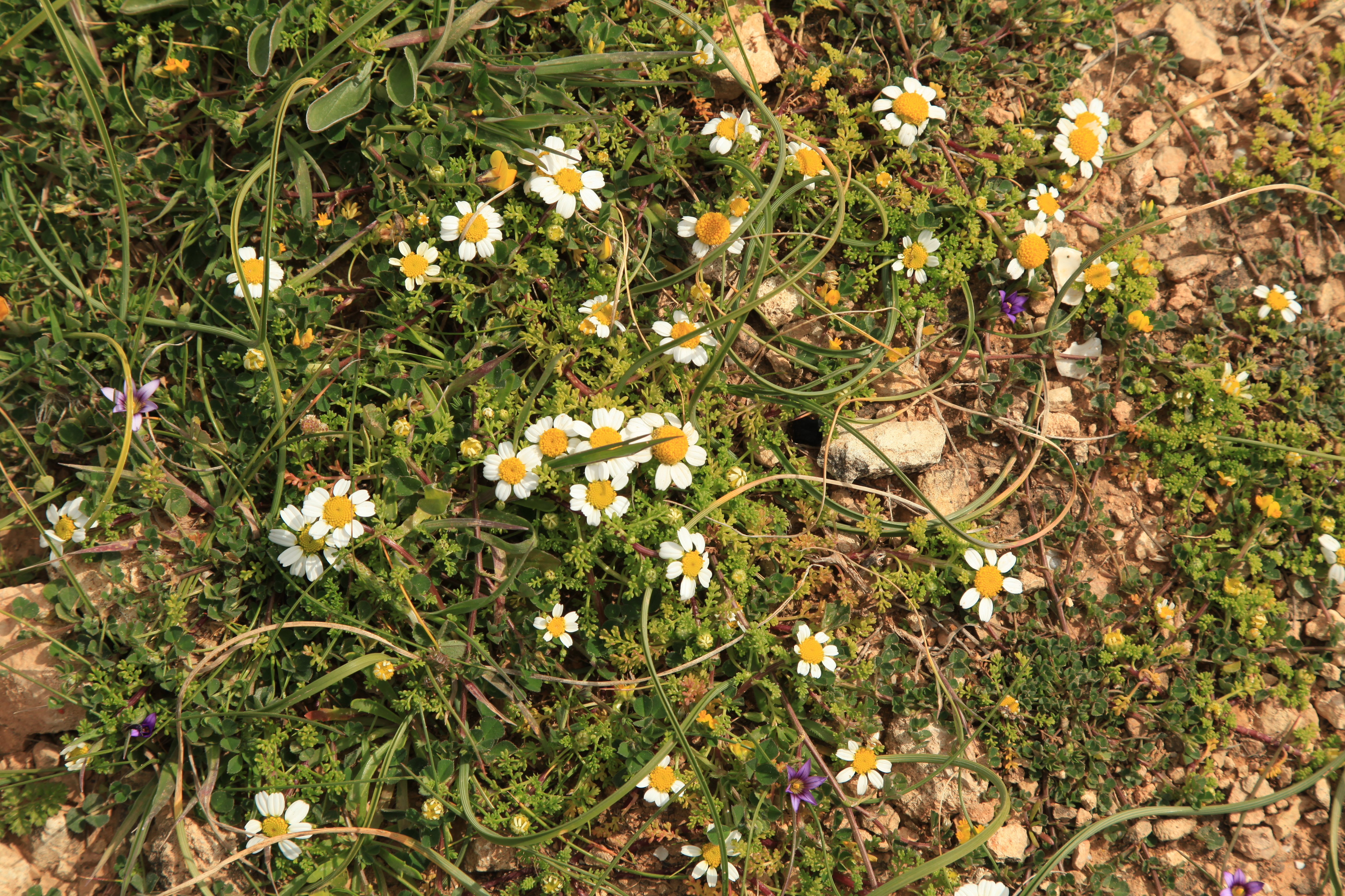 Anthemis urvilleana and Romulea columnae growing in the Xrobb l-Għaġin Park, Triq Delimara in Marsaxlokk, Malta